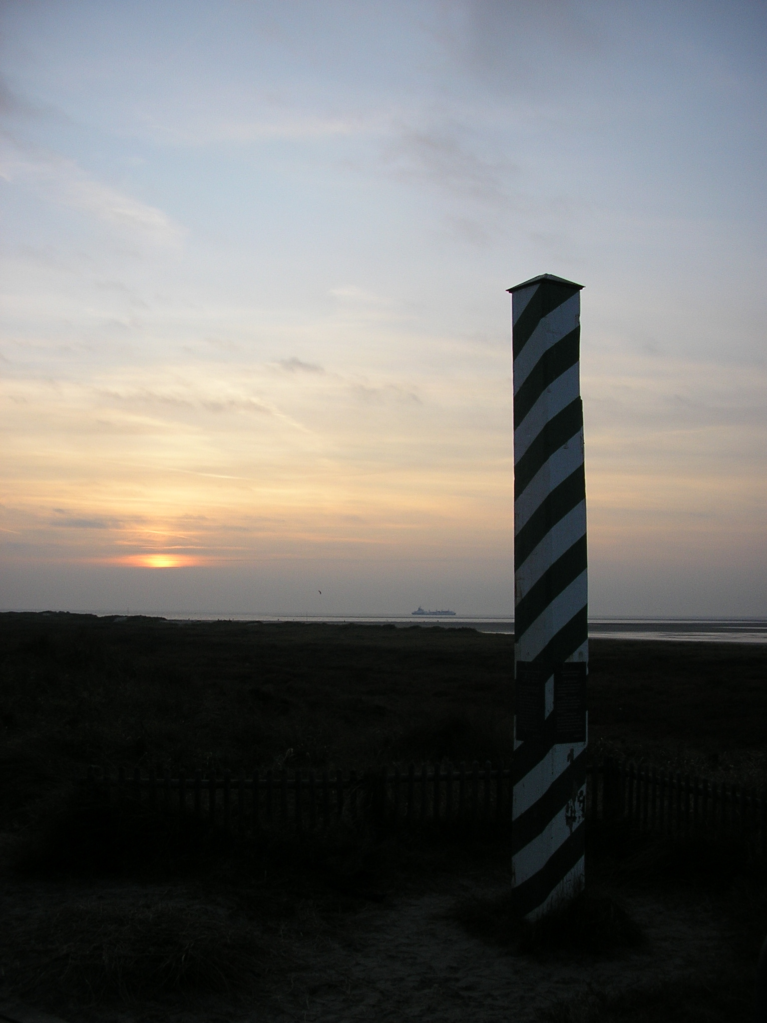 Nordwestlichster Landpunkt Deutschlands auf der Insel Borkum